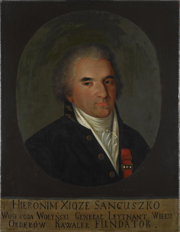 Беларуская (тарашкевіца): Партрэт Гераніма Януша Сангушкі (Hieranim Januš Sanguška)